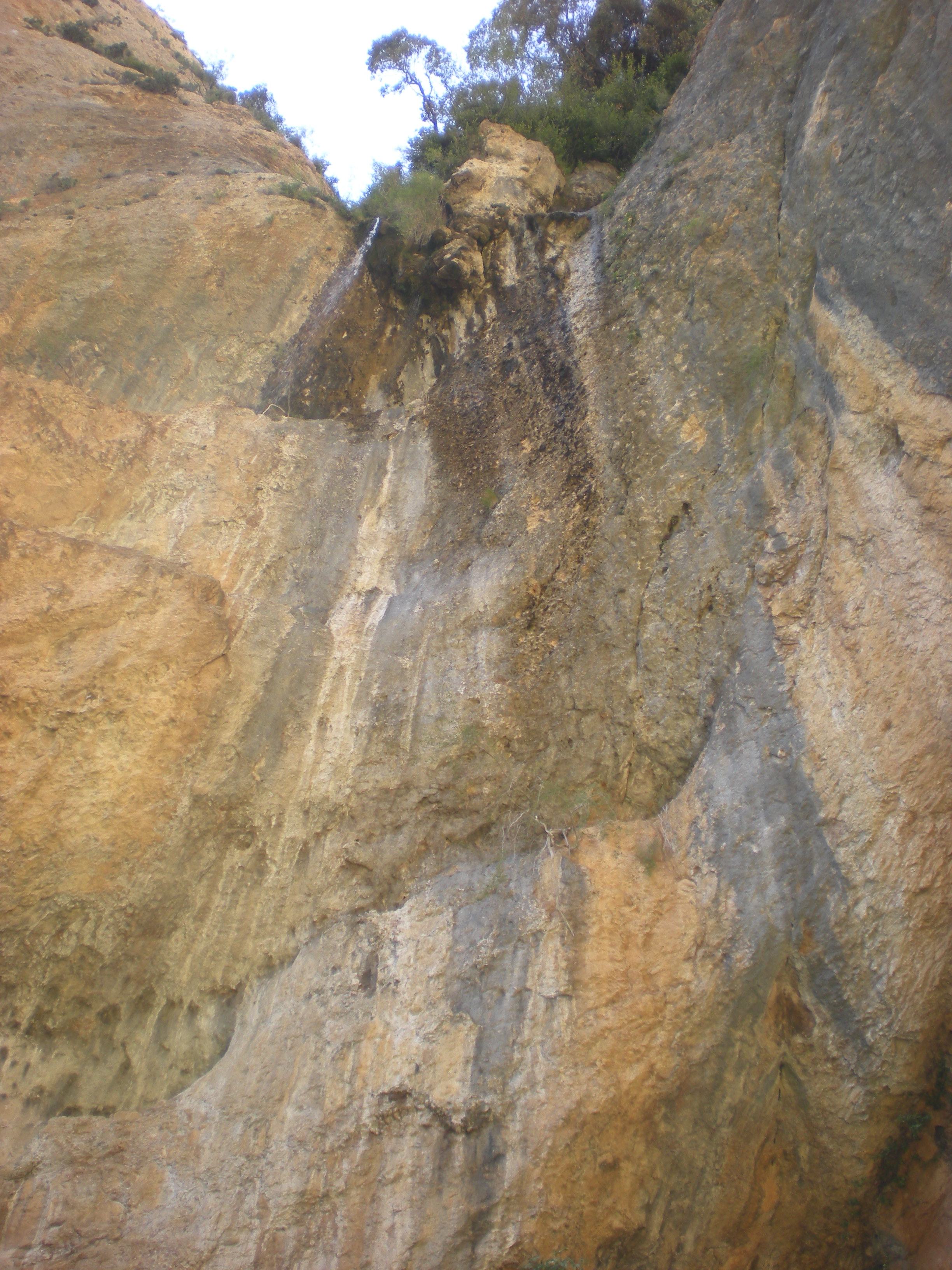 Cascada junto a ermita de San Martín de la Bal d'Onsera